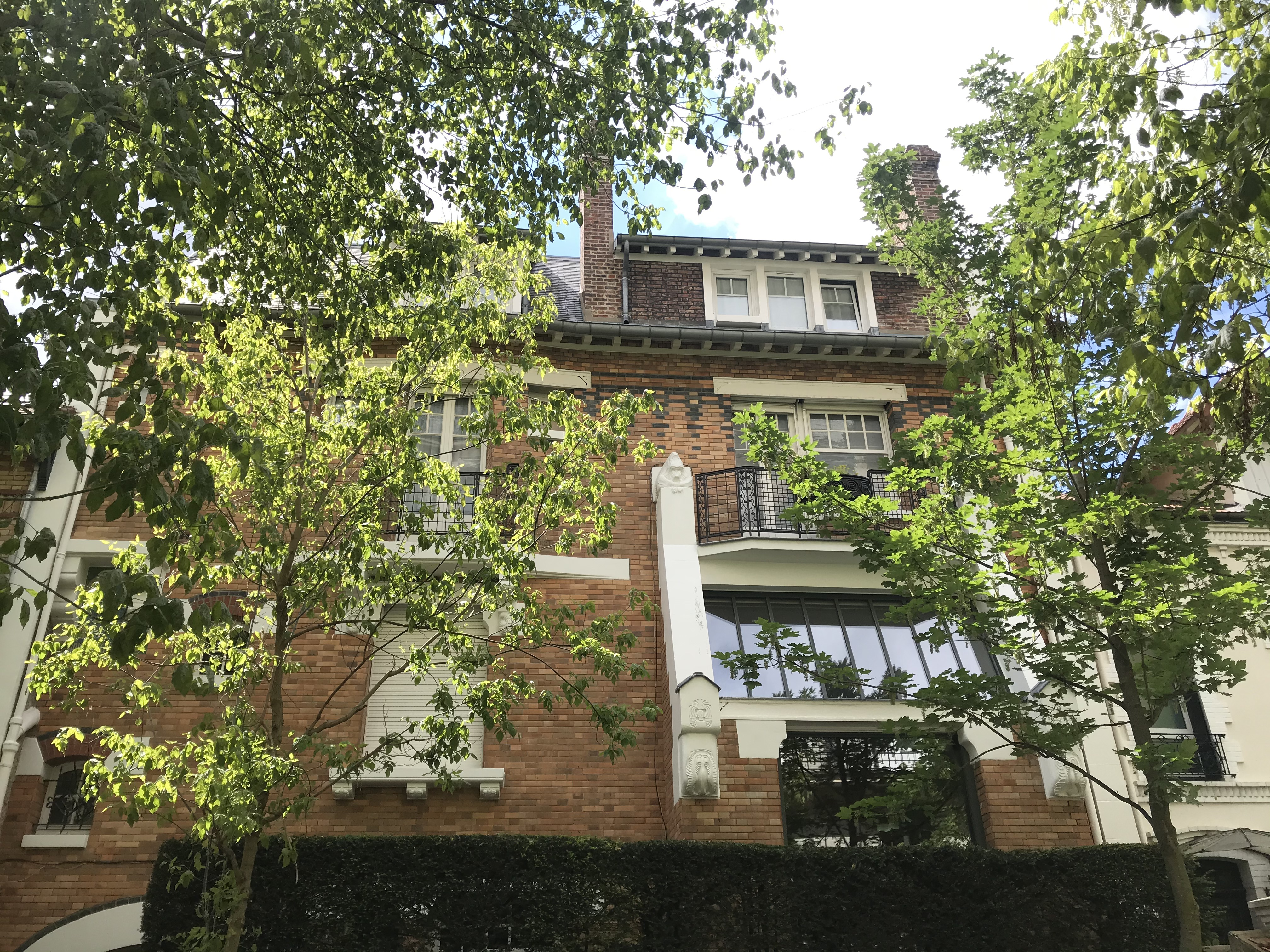 Maison de S. U. Zanne à Vincennes, 6, rue Eugénie-Gérard.